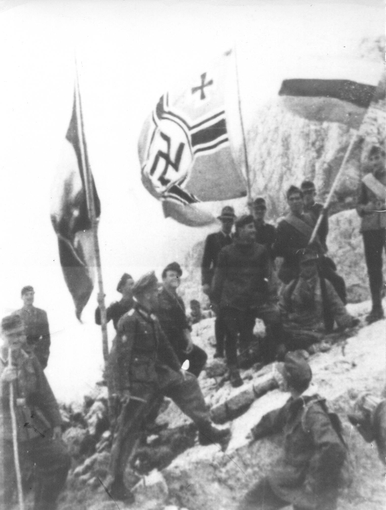 Srpskohrvatski / српскохрватски: Isticanje nemačke, italijanske i bugarske zastave na Bobotovom Kuku, na Durmitoru, juna 1943. godine.